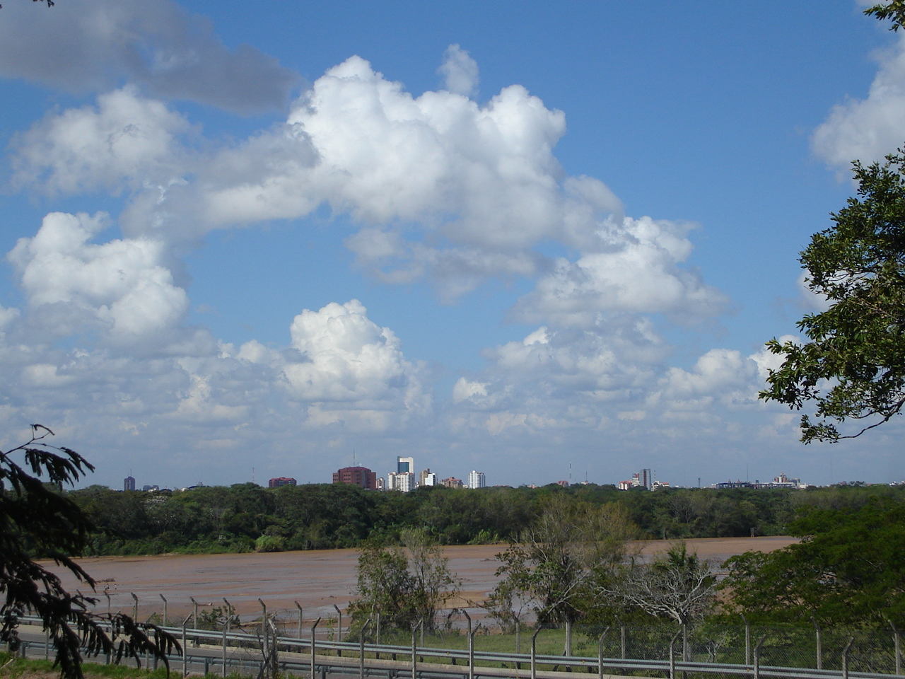 Panorama de Santa Cruz de la Sierra